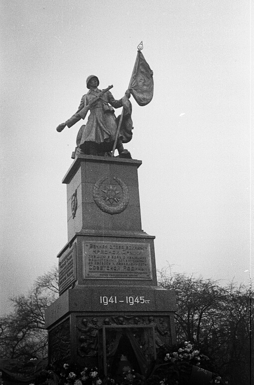 Original image description from the Deutsche FotothekDenkmal der Roten Armee von Otto Rost (geschaffen 1945) ehemaliger Standort ist der heutige Albertplatz / Dresden-Neustadt, Sommer 1947